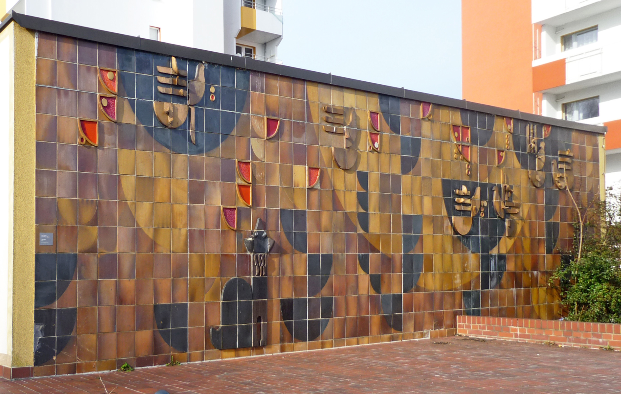 Wandbild "Der Fuchs und die Trauben" von Gerhard Bondzin am Haus Leutewitzer Ring 5 in Dresden-Gorbitz